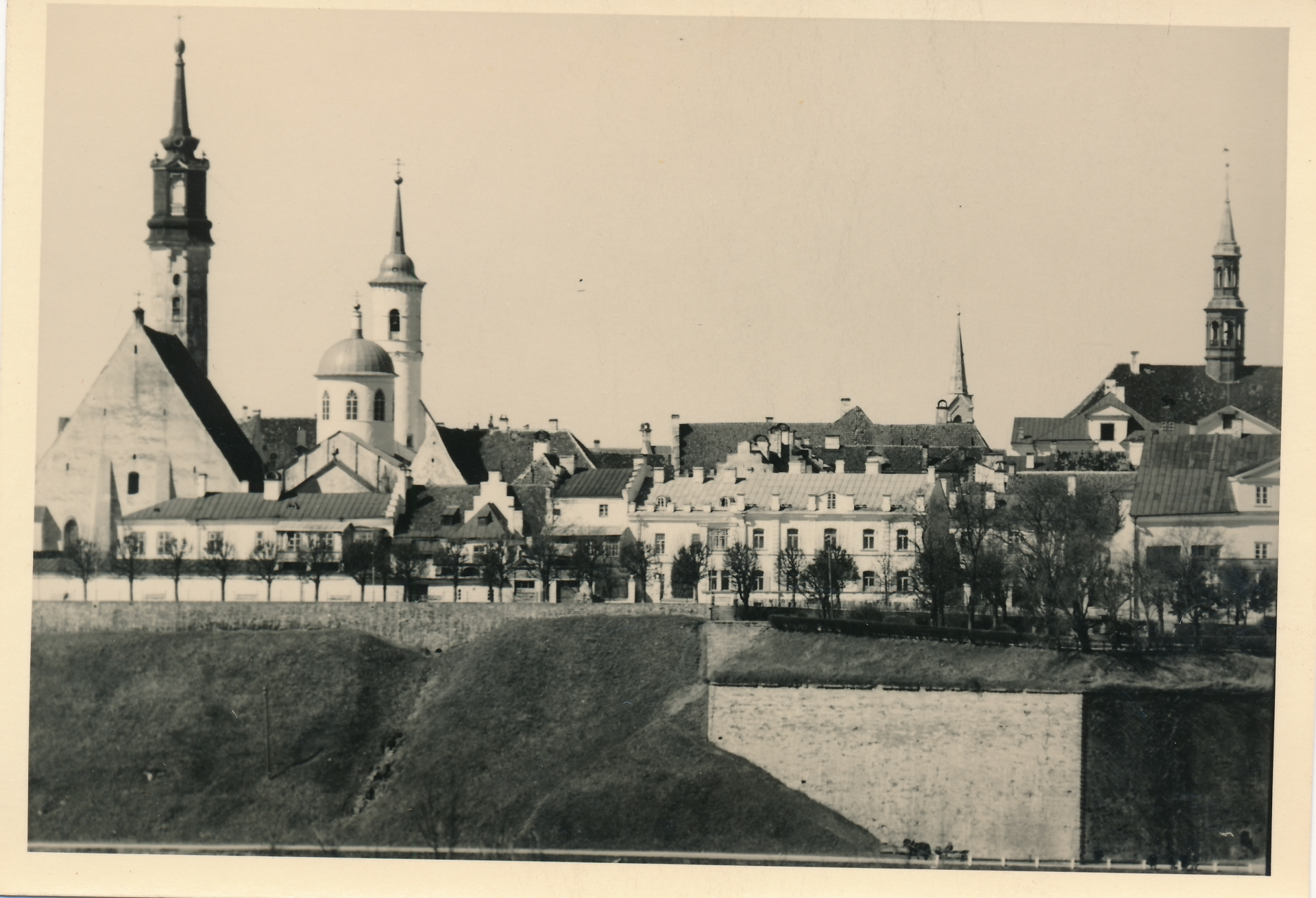 Narva vanalinn